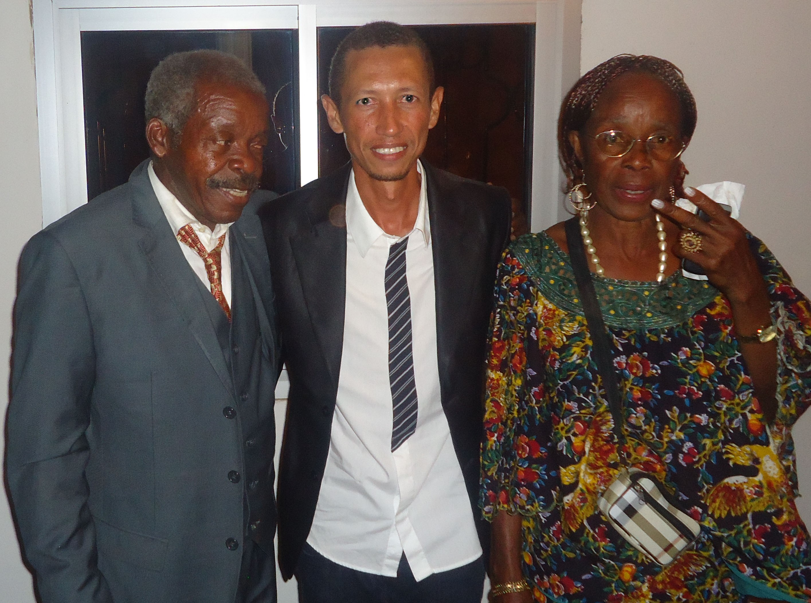 Eric Mendi, avec de part et d'autre le dramaturge Guillaume Oyono Mbia et son épouse.